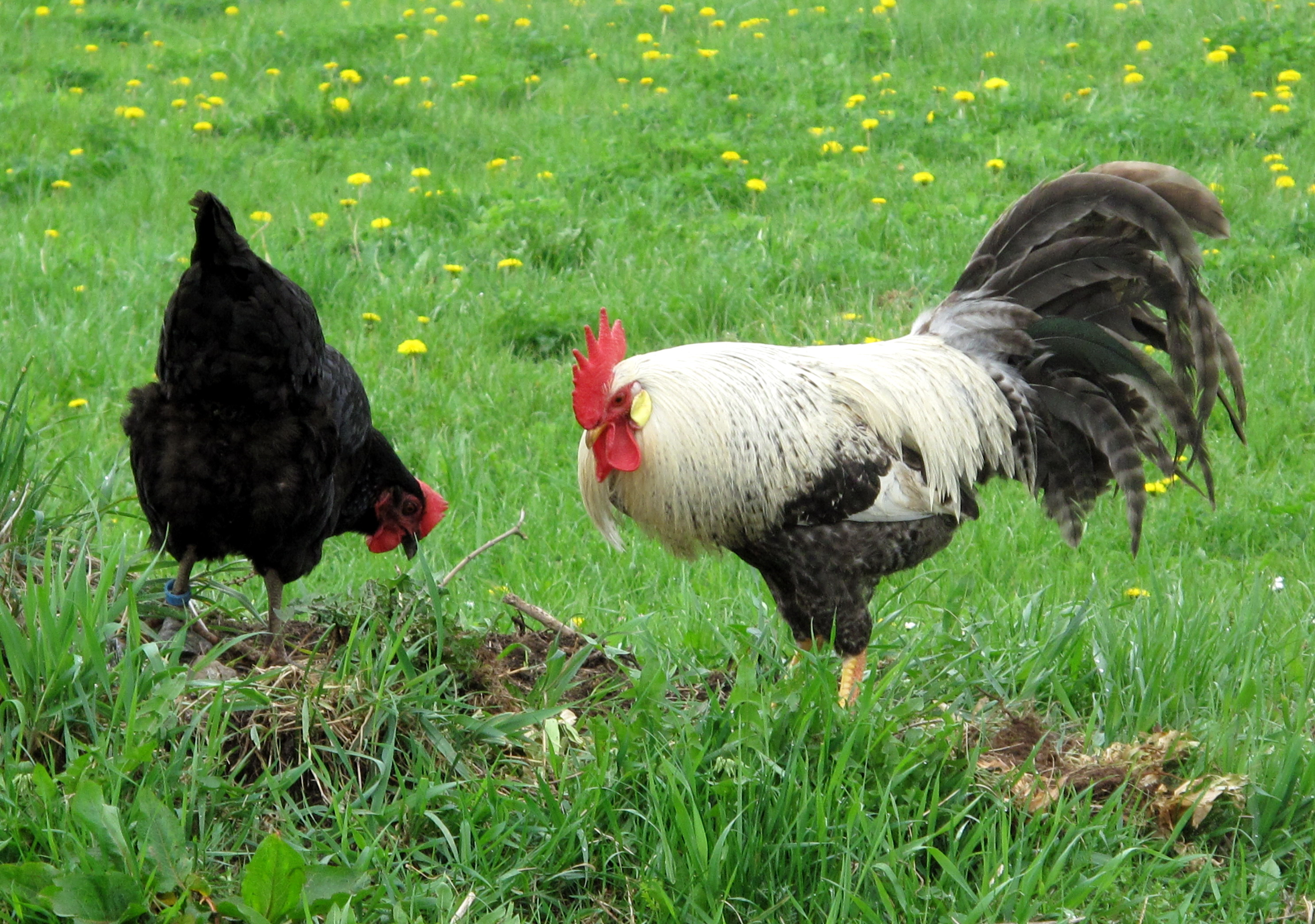 Slepice a kohout